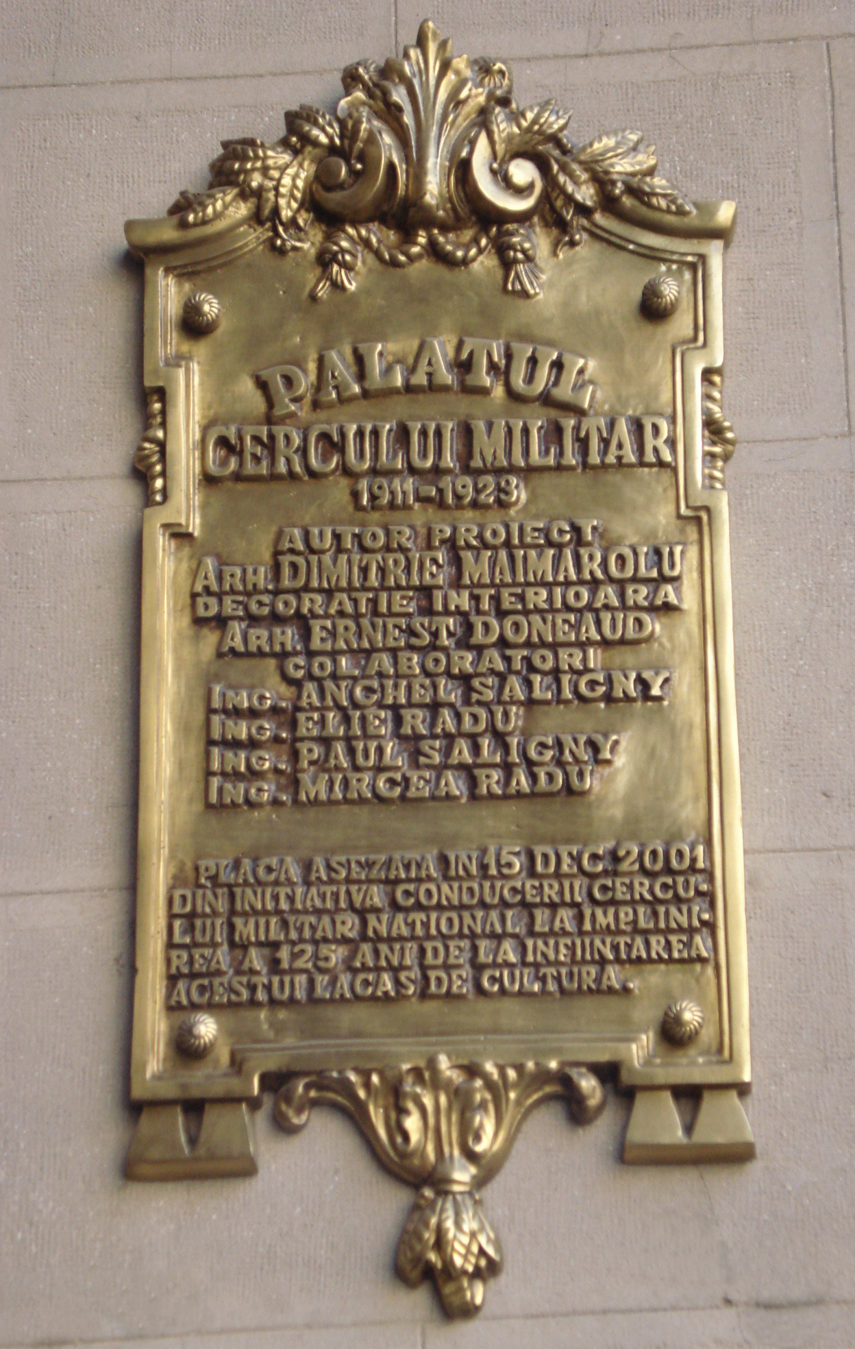 Palatul Cercului Militar - placă de prezentare